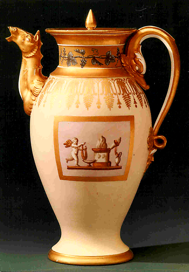 Cioccolatiera dipinta con decoro classico. Ginori a Doccia, primo quarto del XIX secolo